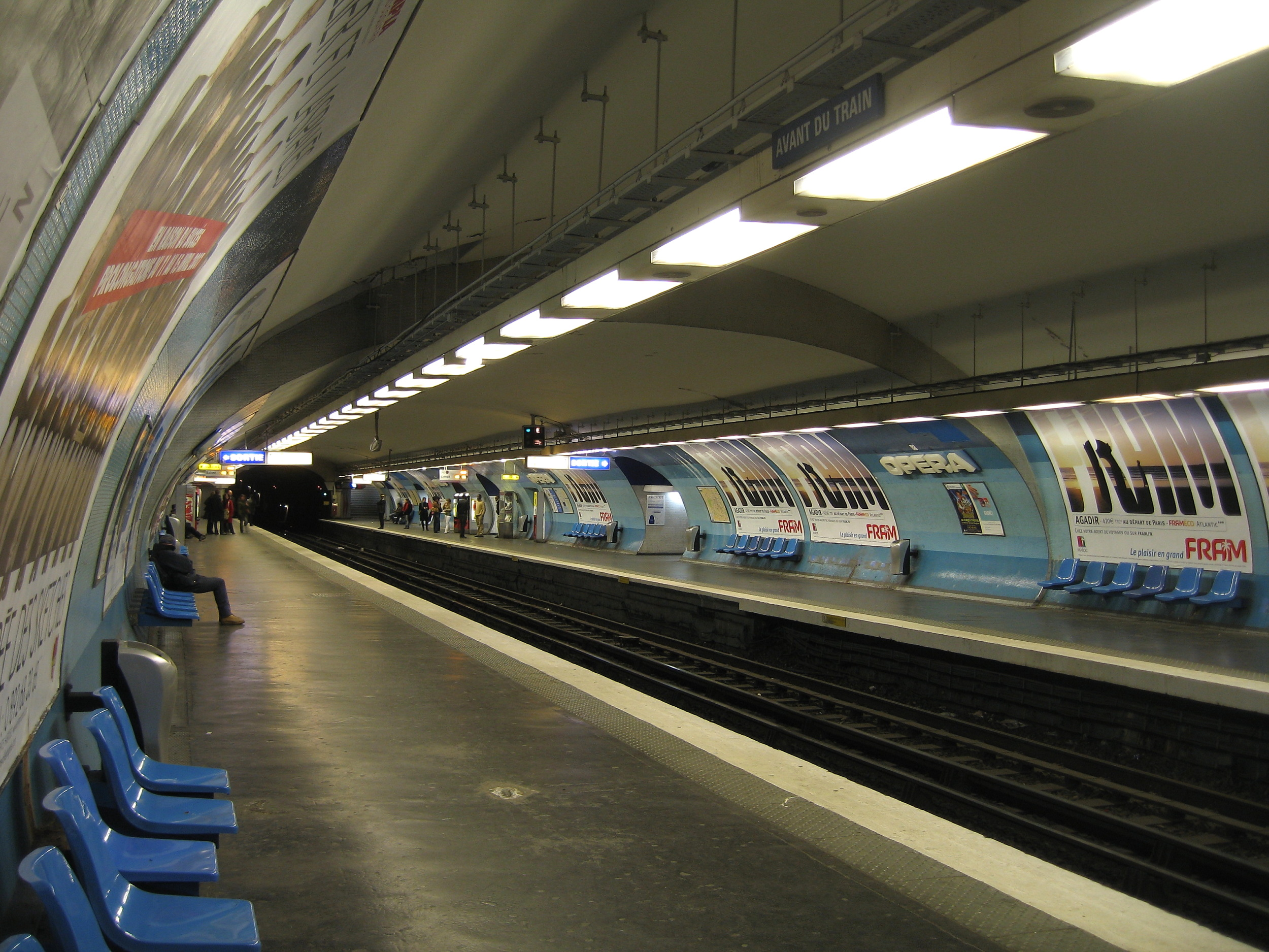 Quai de la ligne 8 du métro de Paris à la station Opéra, vus en direction de Créteil.